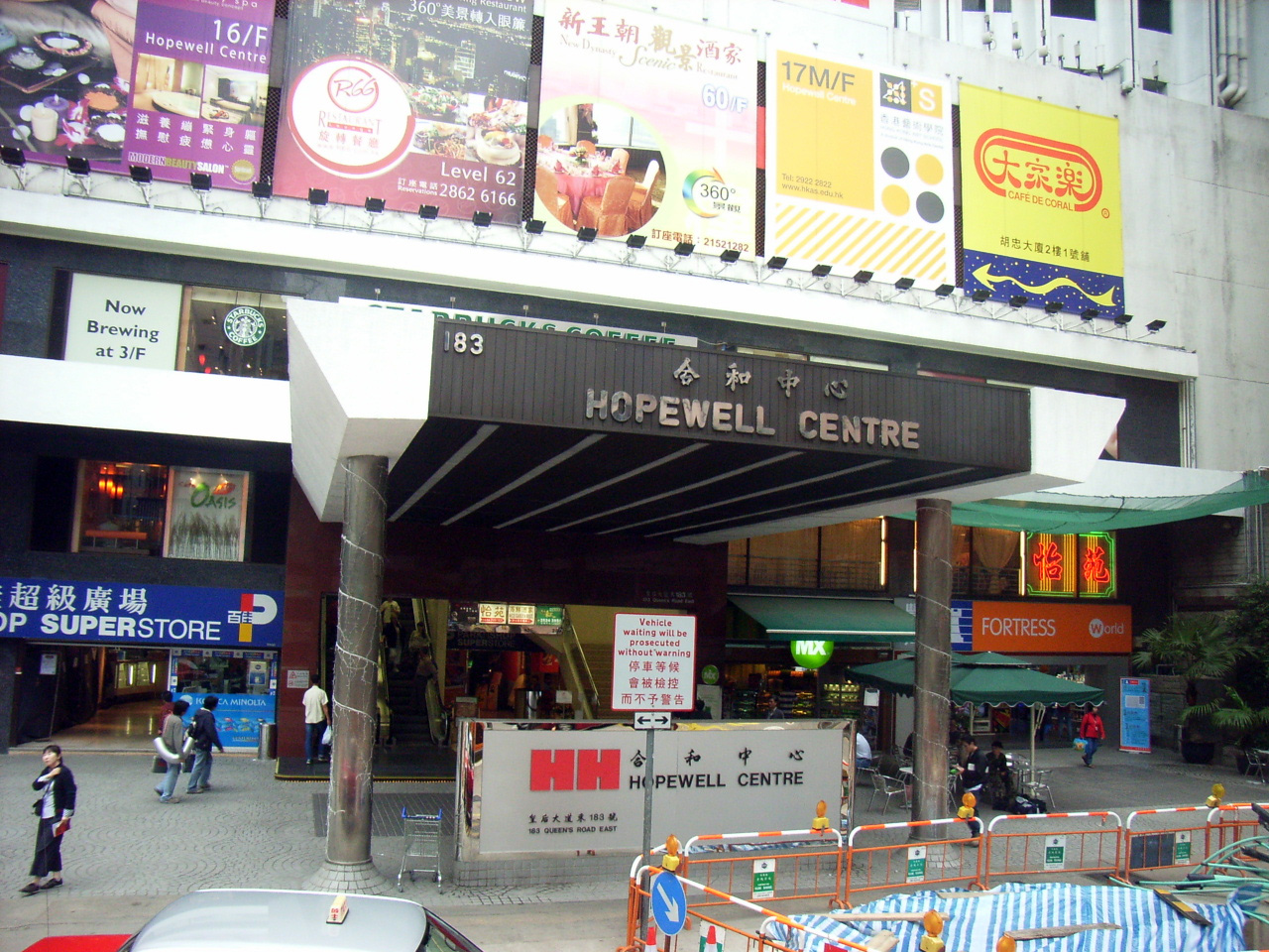 Hopewell Centre, 合和中心 位於香港灣仔皇后大道東183號，樓高66層(216米)，鄰近胡忠大廈，於1980年建成。